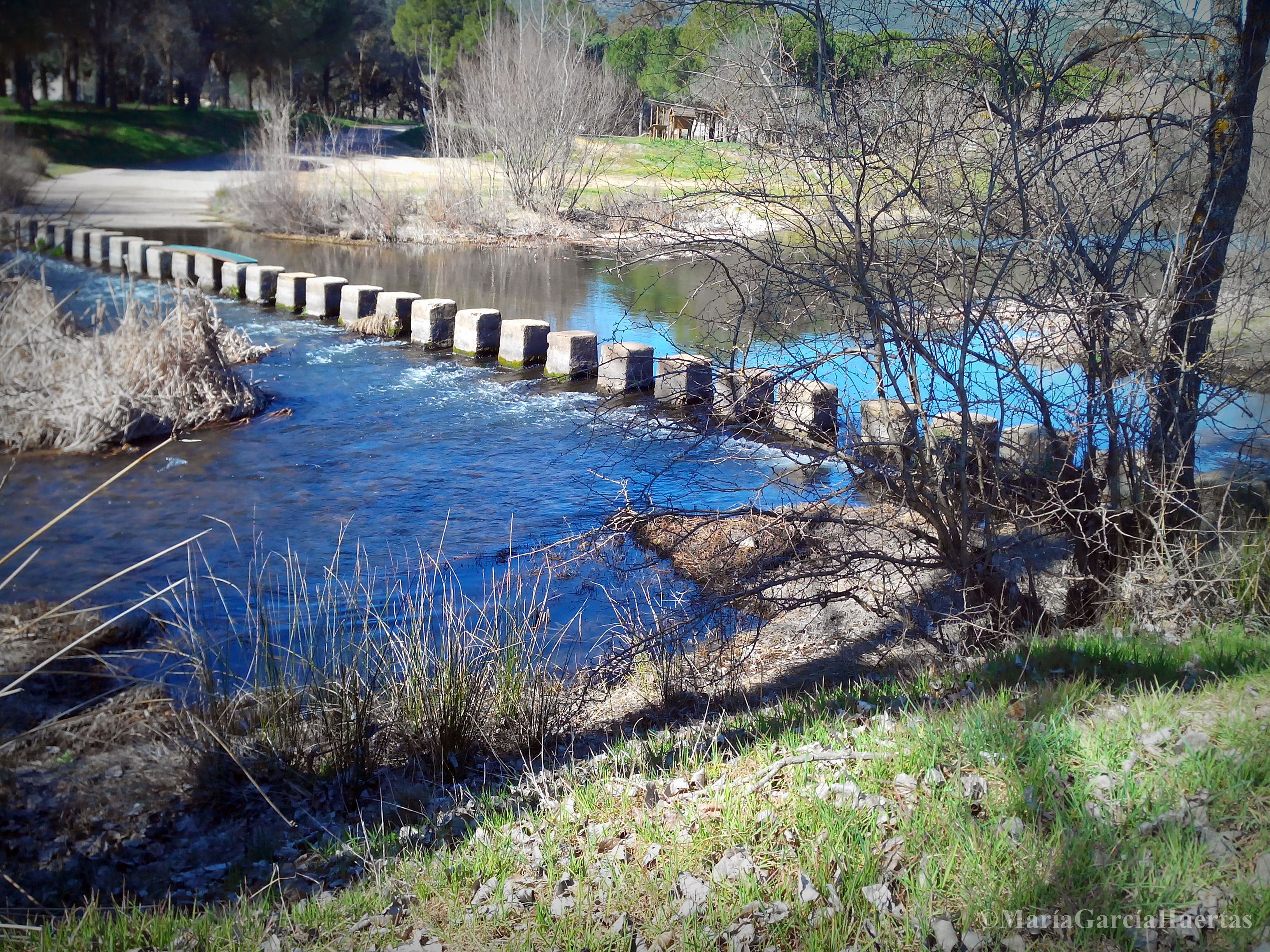 Piedras pasaderas sobre el río Guadiana, en el municipio de Luciana, Ciudad Real, España.